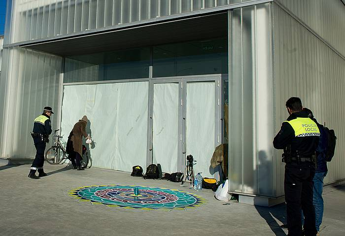 Krea